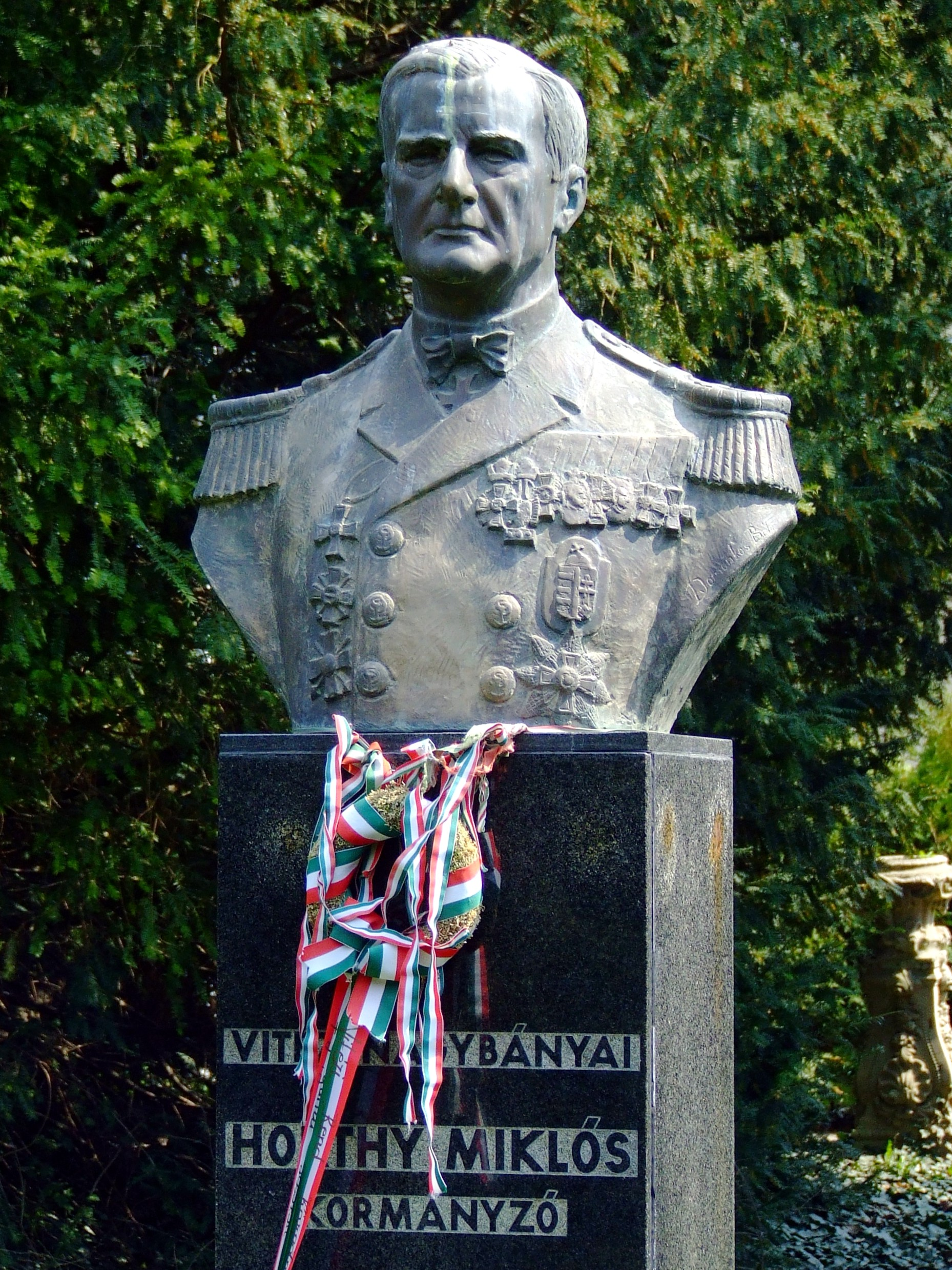 Horthy Miklós szobra Kenderesen. Domonkos Béla szobrászművész alkotása (1993)